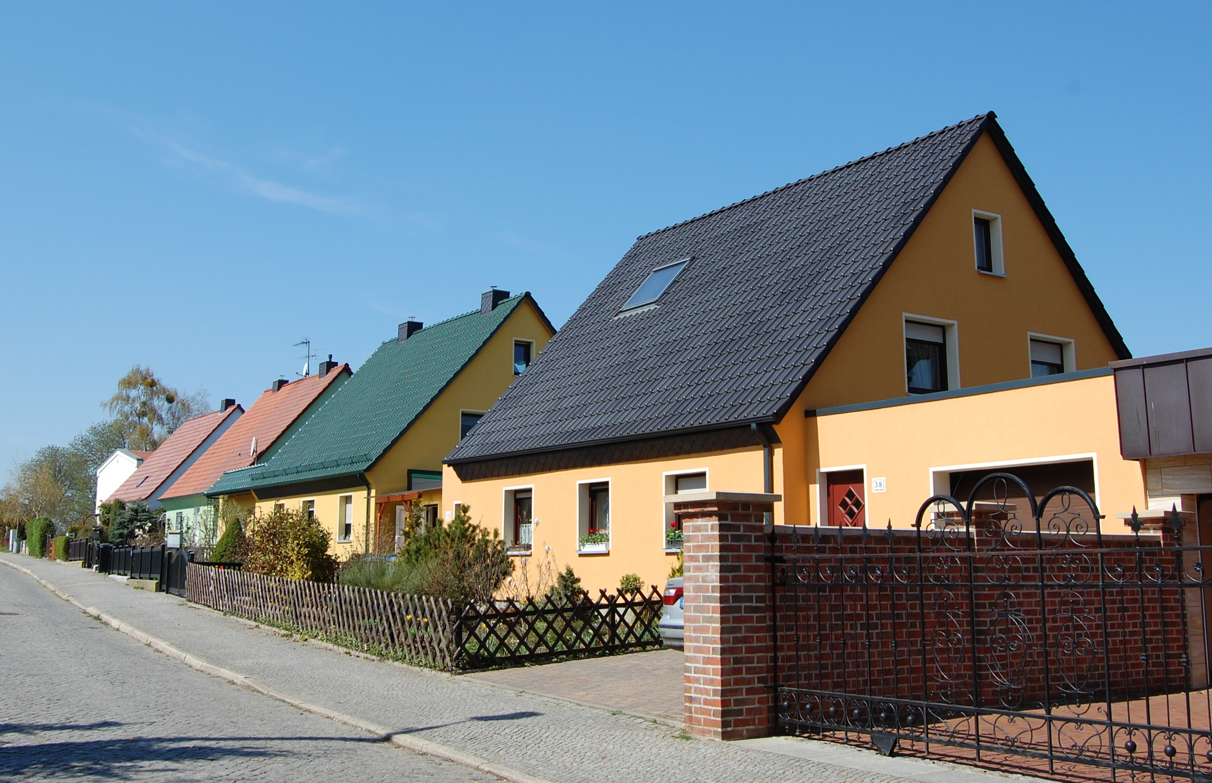 Geraer Straße in Westerhüsen